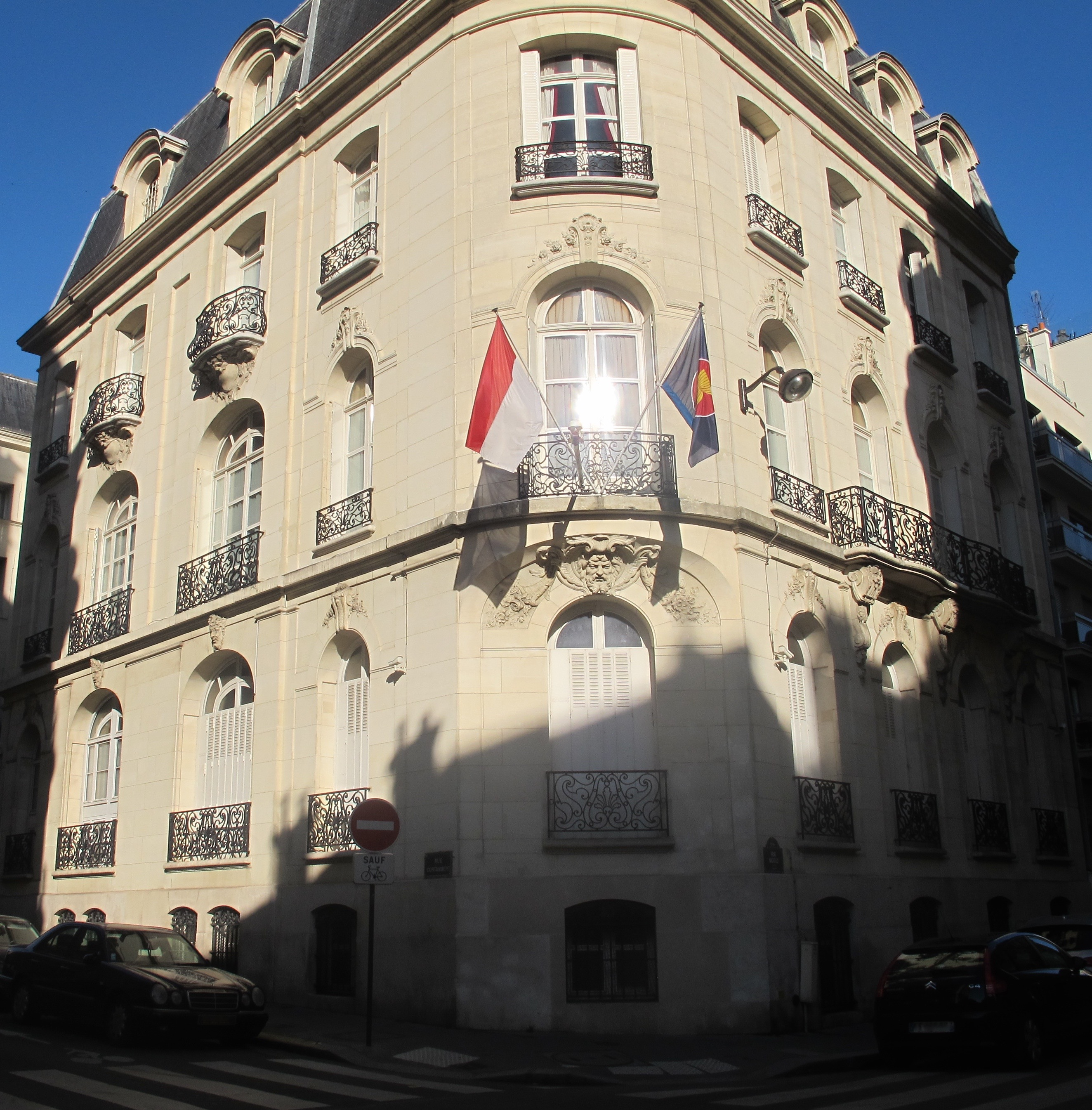 Ambassade d'Indonésie en France, 47-49, rue Cortambert (Paris, 16e).